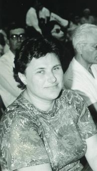 Ольга Арсеньевна Олейник в Ницце в 1970 году